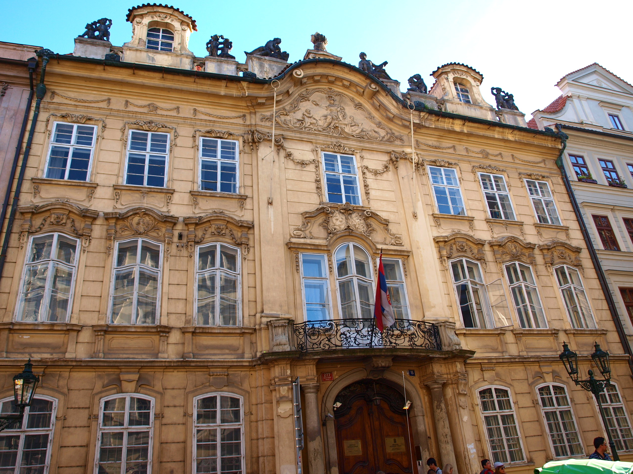 Kounický palác, Praha